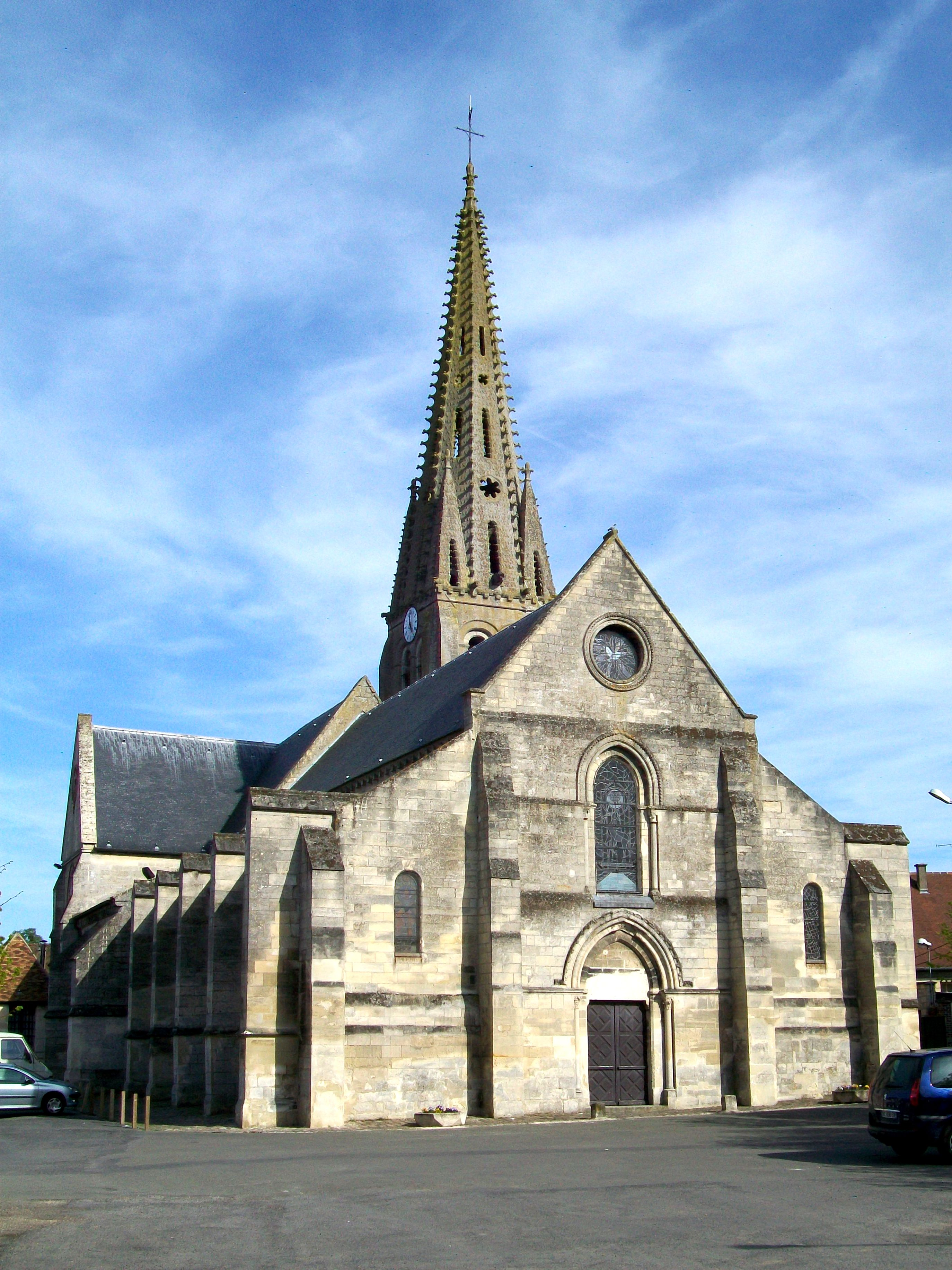 L'église Saint Gervais et Protais et Saint-Martin.